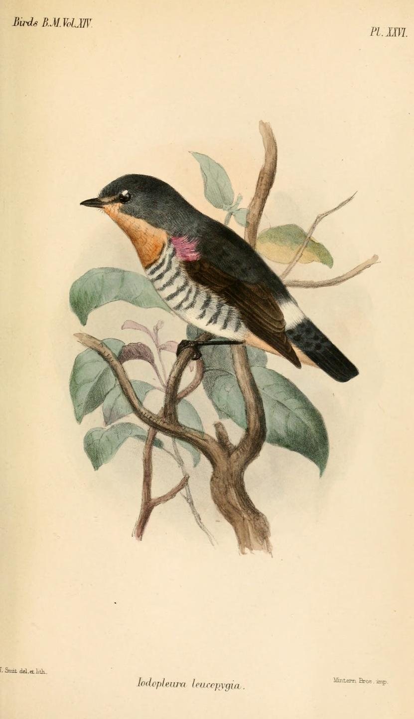 Iodopleura leucopygia = Iodopleura pipra leucopygia, Buff-throated Purpletuft ssp.